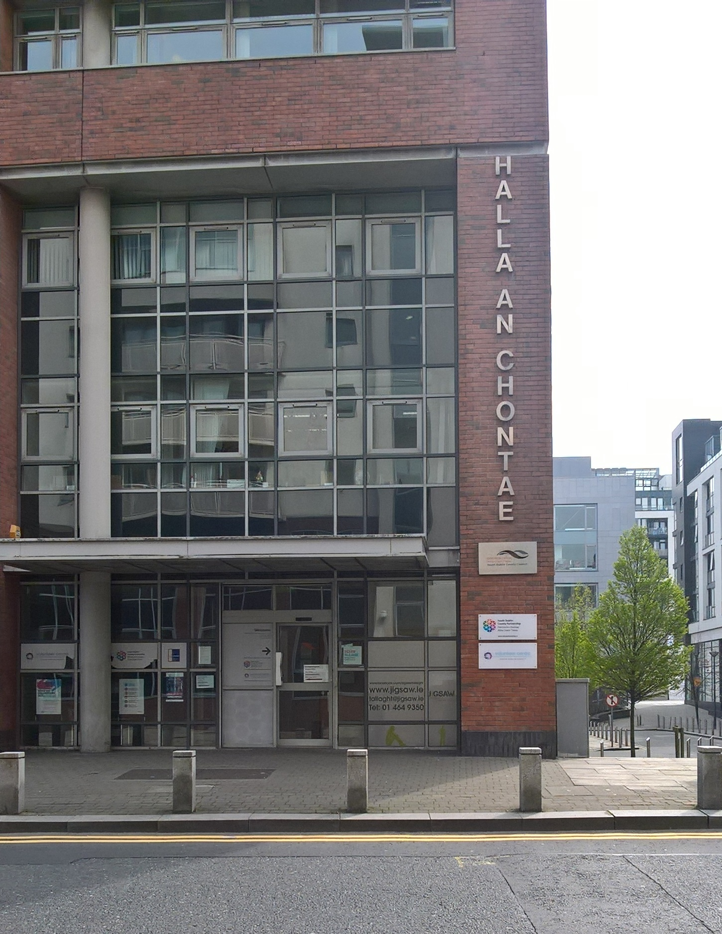 Halla an Chontae, Comhairle Contae Átha Cliath Theas, Tamhlacht (2019).